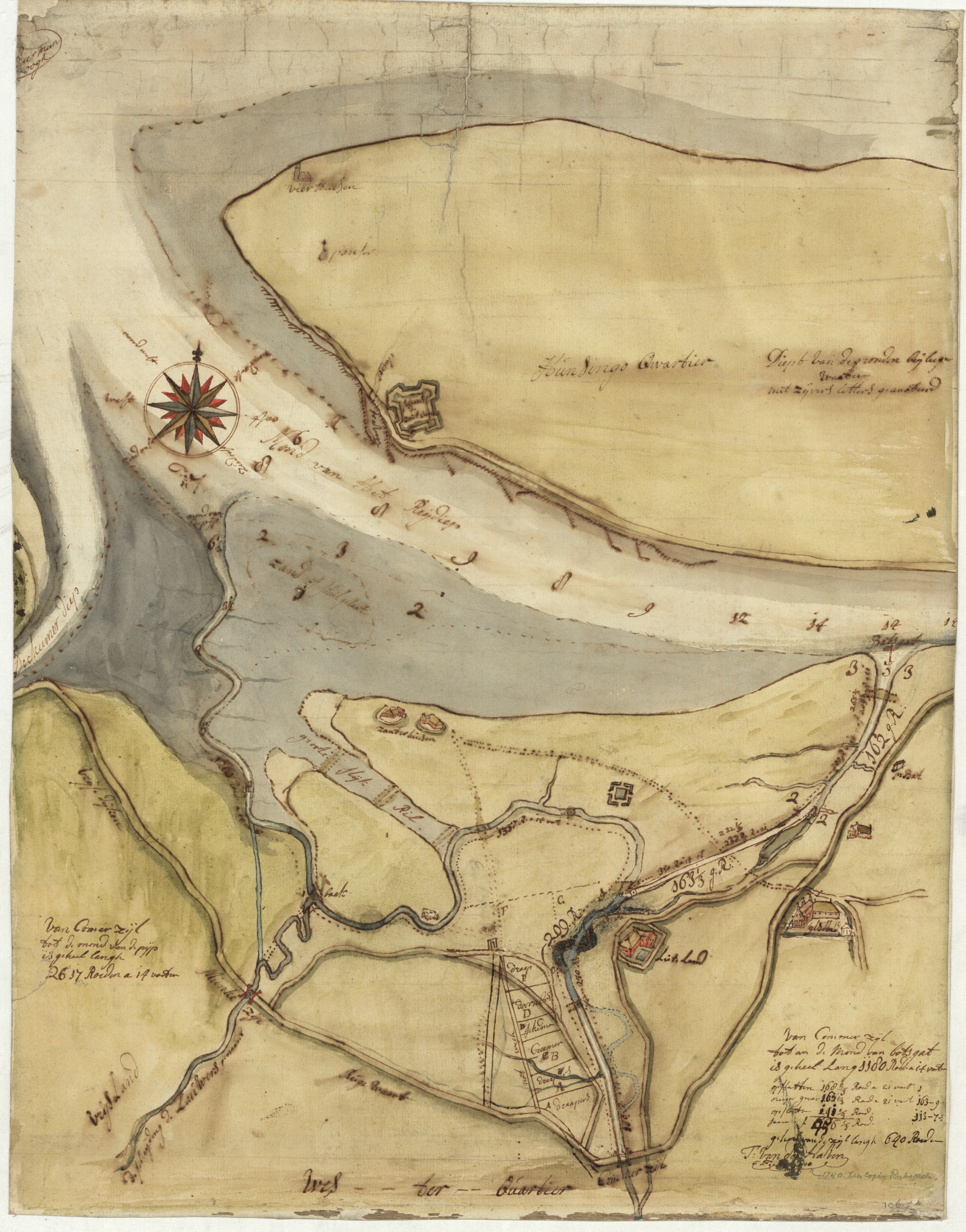 Kaart van de mond van het Reitdiep met de uiterdijks- en kwelderlanden ten noorden van Kommerzijl met het project voor een nieuw afwateringskanaal naar het Botsgat. De kaart werd waarschijnlijk gebruikt bij de resoluties van de Hoge Justitiekamer van 5 mei, 13 mei en 2 juni 1740.